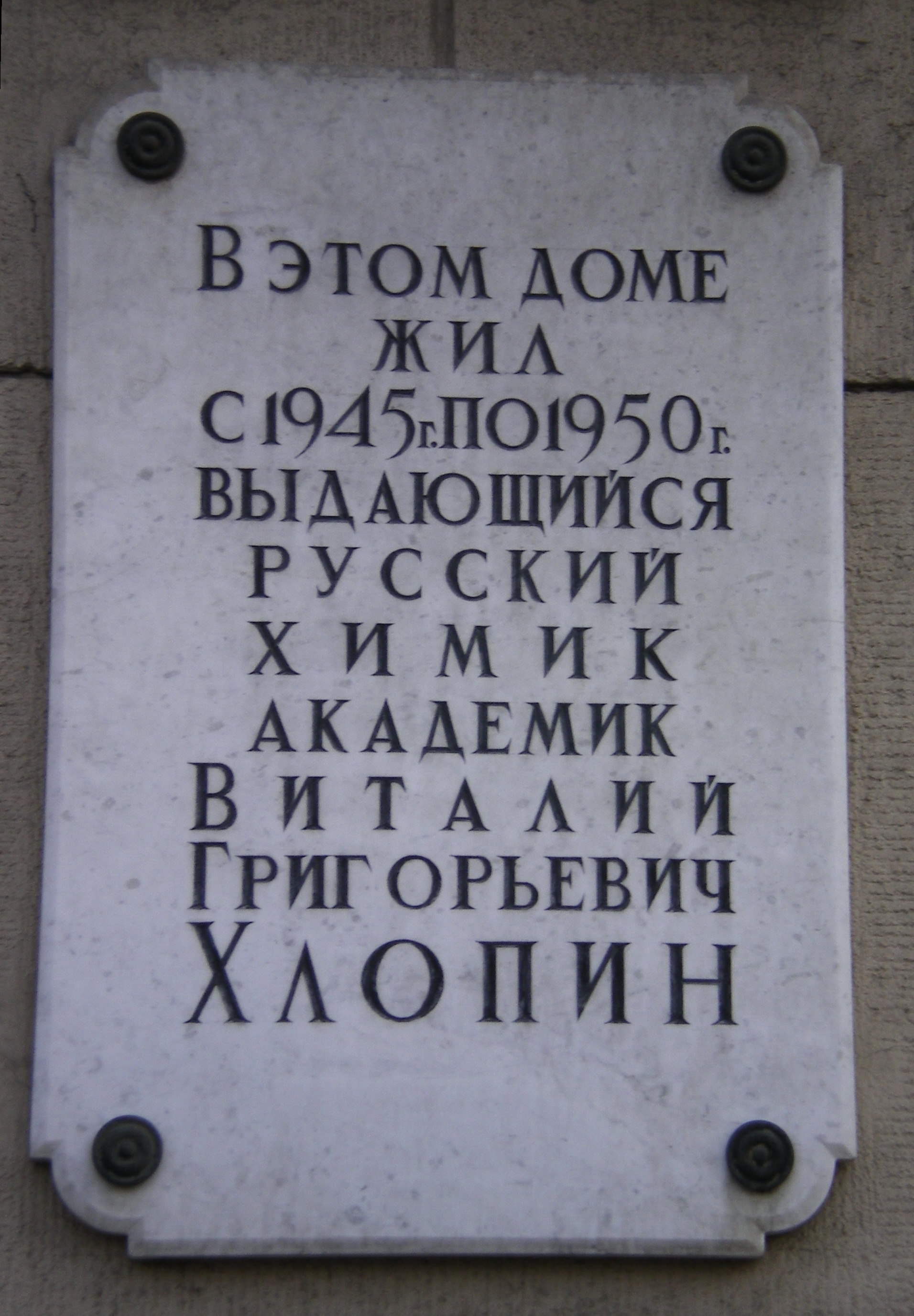 Мемориальная доска В. Г. Хлопину на здании Лесной, 61.